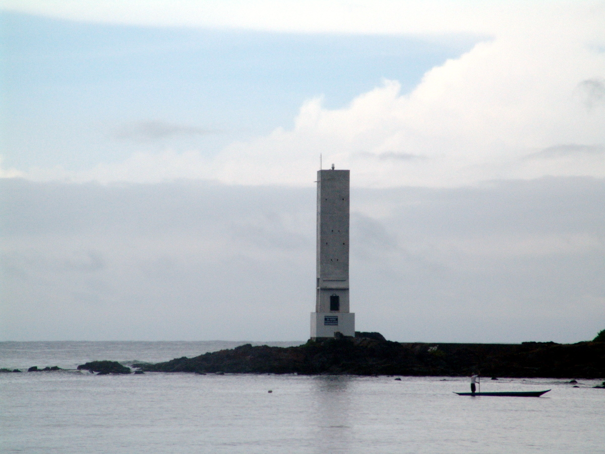 Farol de Contas ou da Ilhota de Contas